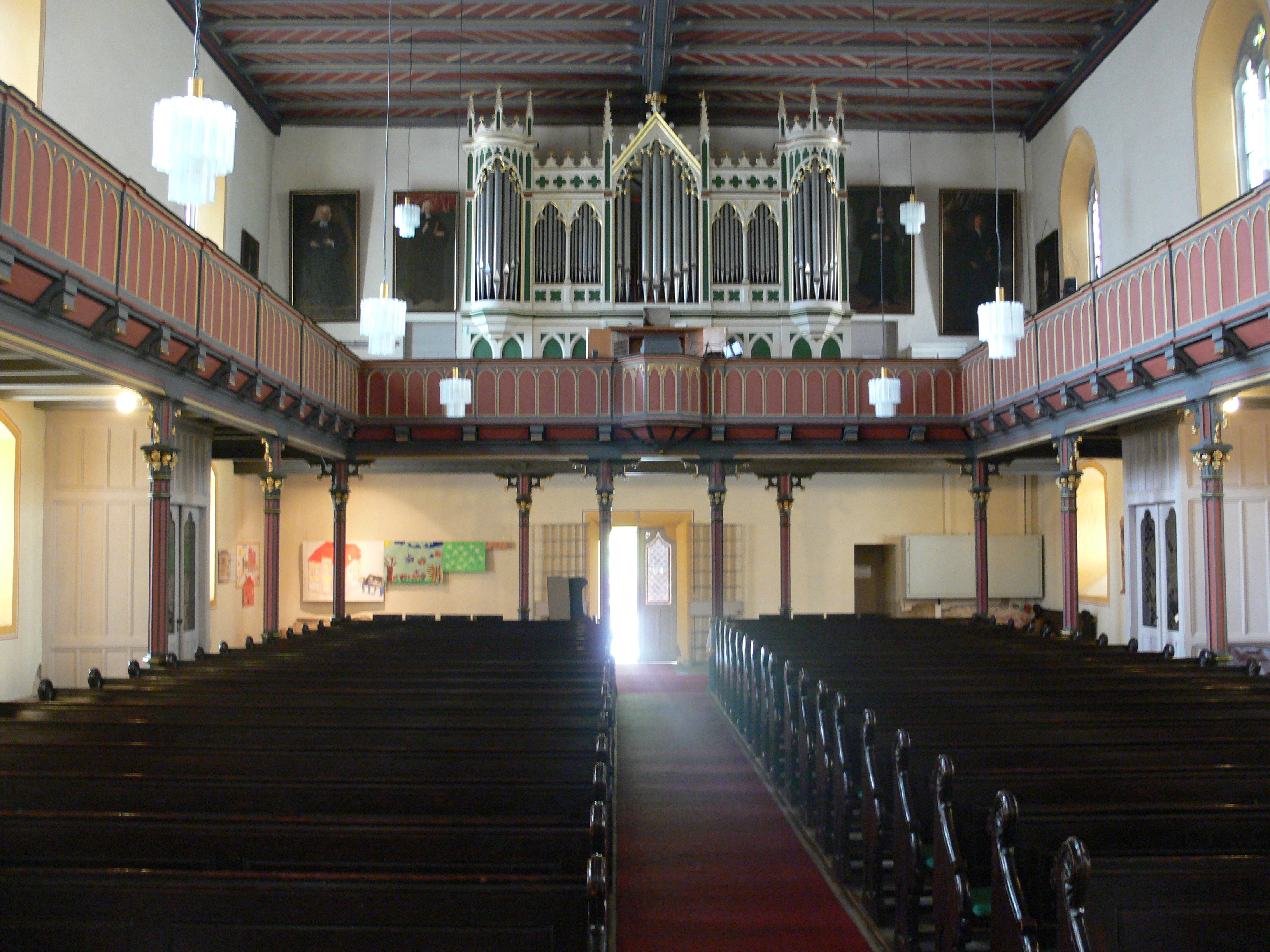 Eisenberg (Thüringen), Stadtkirche St. Peter Orgel; Prospekt: 1889 von Gebr. Poppe; Werk: Böhme, Gotha, 1977 (2 Manuale, 21 Register)